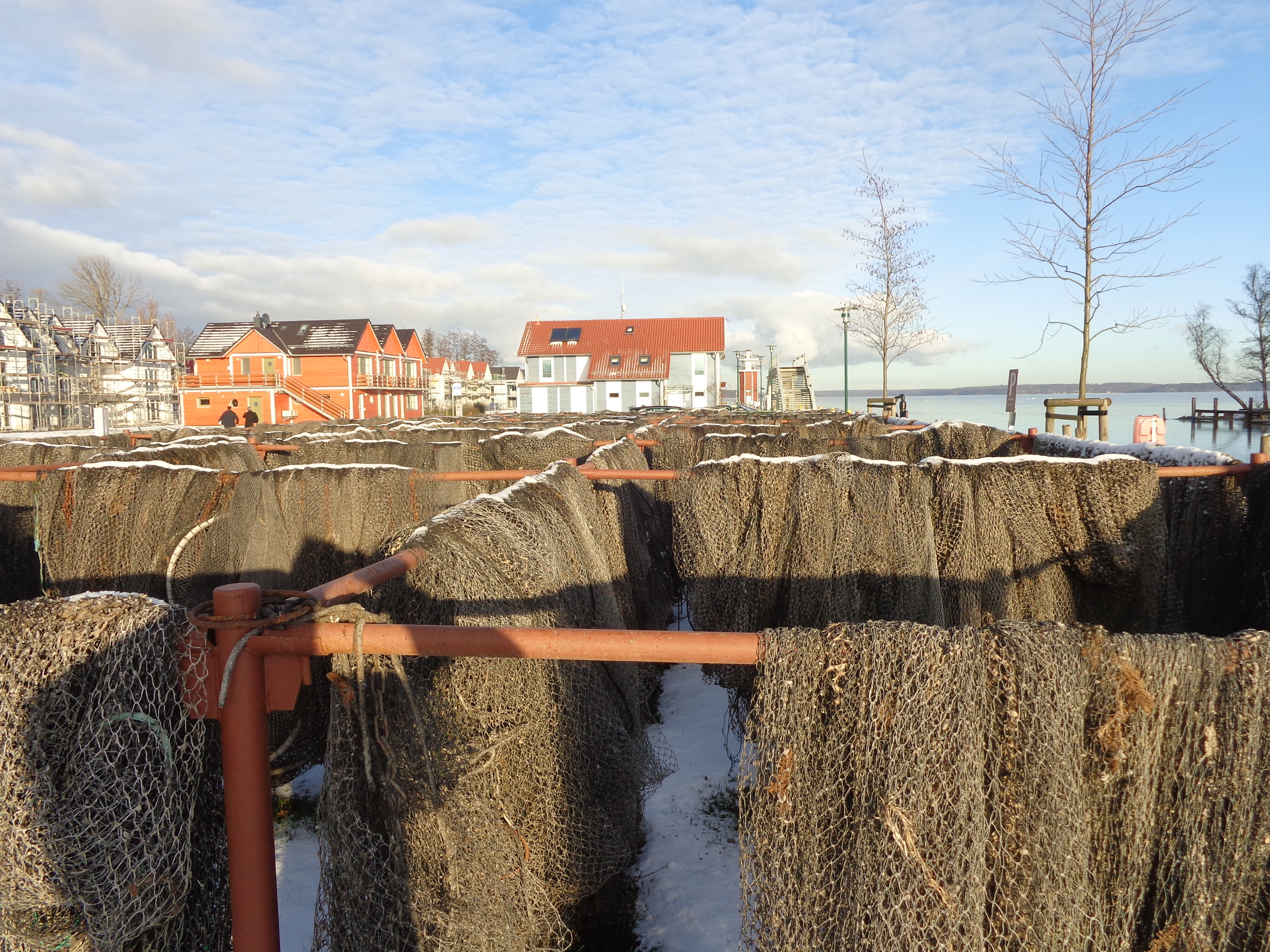 Fischernetze an der Eldemündung in Plau am See.